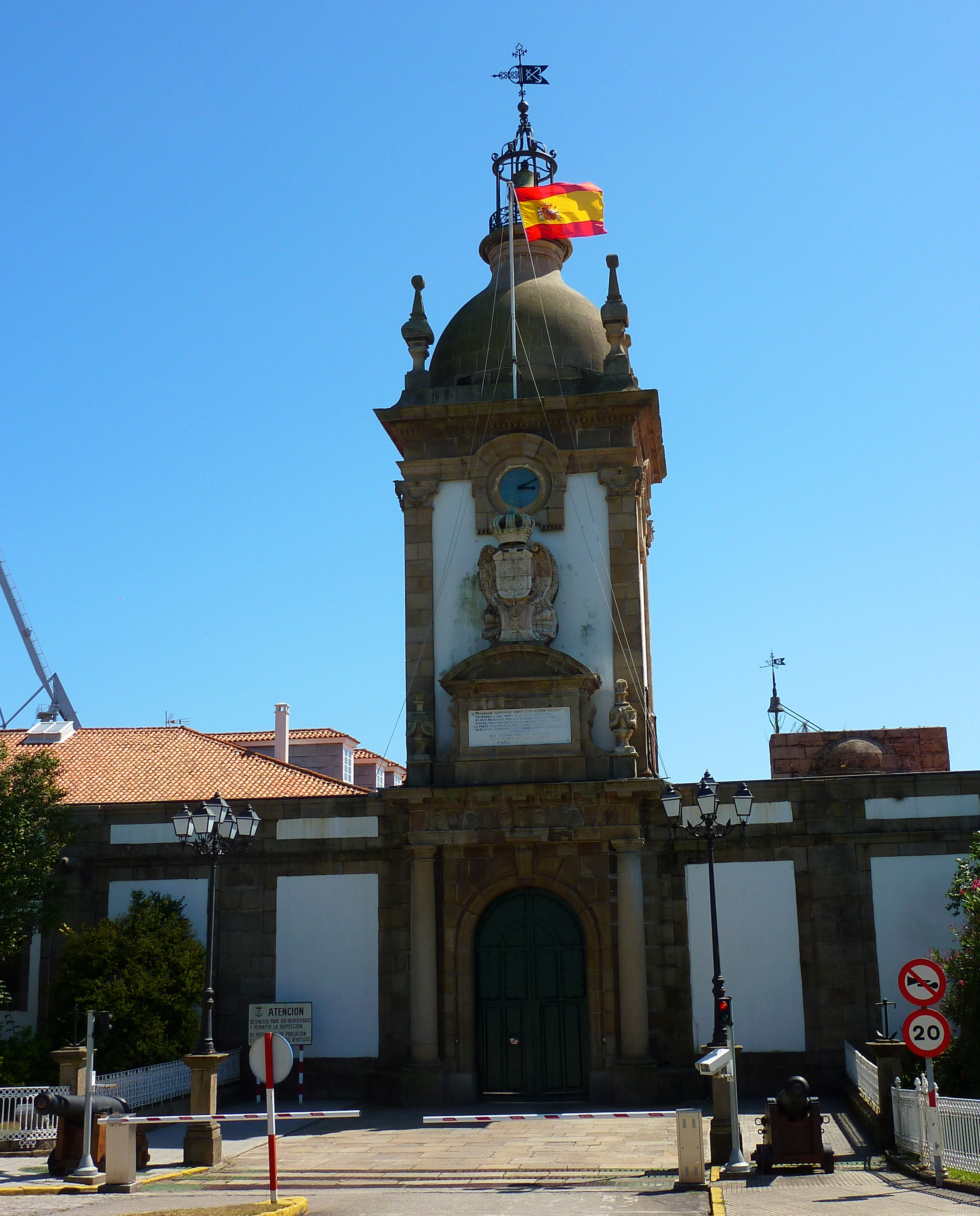 Arsenal de Ferrol - Puerta del Dique.